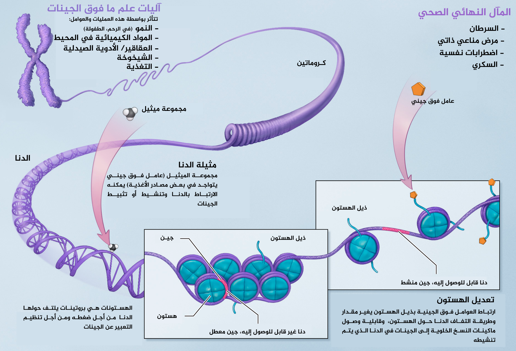 تتأثر آليات علم ما فوق الجينات بعدة عوامل وعمليات منها النمو داخل الرحم وفي الطفولة، المواد الكيميائية الموجودة في المحيط المعيشي، العقاقير والأدوية الصيدلة المتناولة، الكبر في السن، ونظام التغذية. تحدث مثيلة الدنا عندما ترتبط مجموعة ميثيل (وهي عامل فوق جيني يتواجد في بعض مصادر الأغذية) بالدنا والتي يمكنها تنشيط أو تثبيط الجينات. الهستونات هي البروتينات التي يلتف حولها الدنا من أجل ضغطه وتنظيم عملية التعبير عن الجينات. يحدث تعديل الهستون عند ارتباط عامل فوق جيني بذيل الهستون ويغير مقدار التفاف الدنا حوله و يسمح بقابلية وصول آليات النسخ الخلوية إلى الجينات الموجود في الدنا الذي يتم تنشيطه. جميع هذه العوامل والعمليات يمكن أن تؤثر على صحة الفرد ونتائجهم الصحية الممكنة مسببة السرطان، أمراض المناعة الذاتية، اضطرابات نفسية، السكري وغيرها من الأمراض. معاهد الصحة الوطنية الأمريكية.